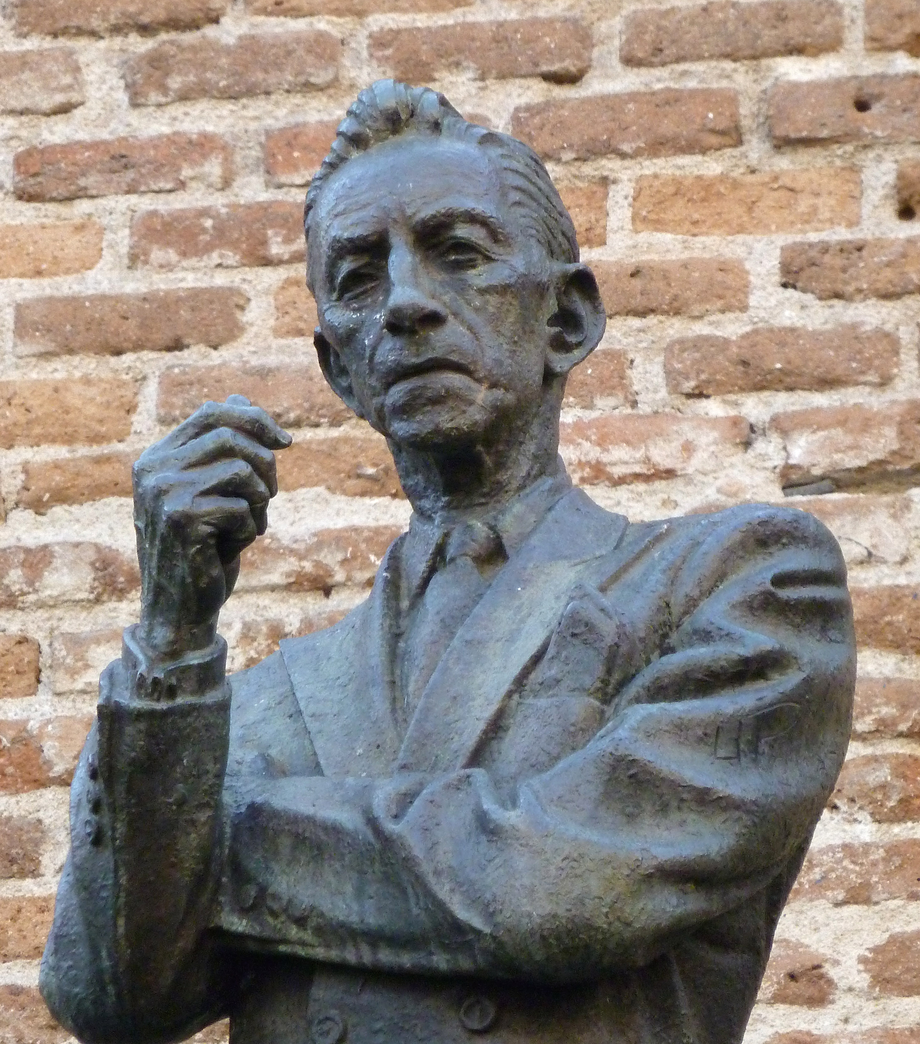 Depicted person: Agustín Lara.